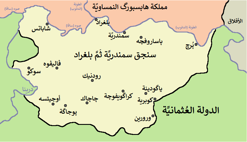 سنجق سمندريَّة، ثُمَّ بلغراد، التابع لِإيالة الروملِّي العُثمانيَّة، سنة 1791م.